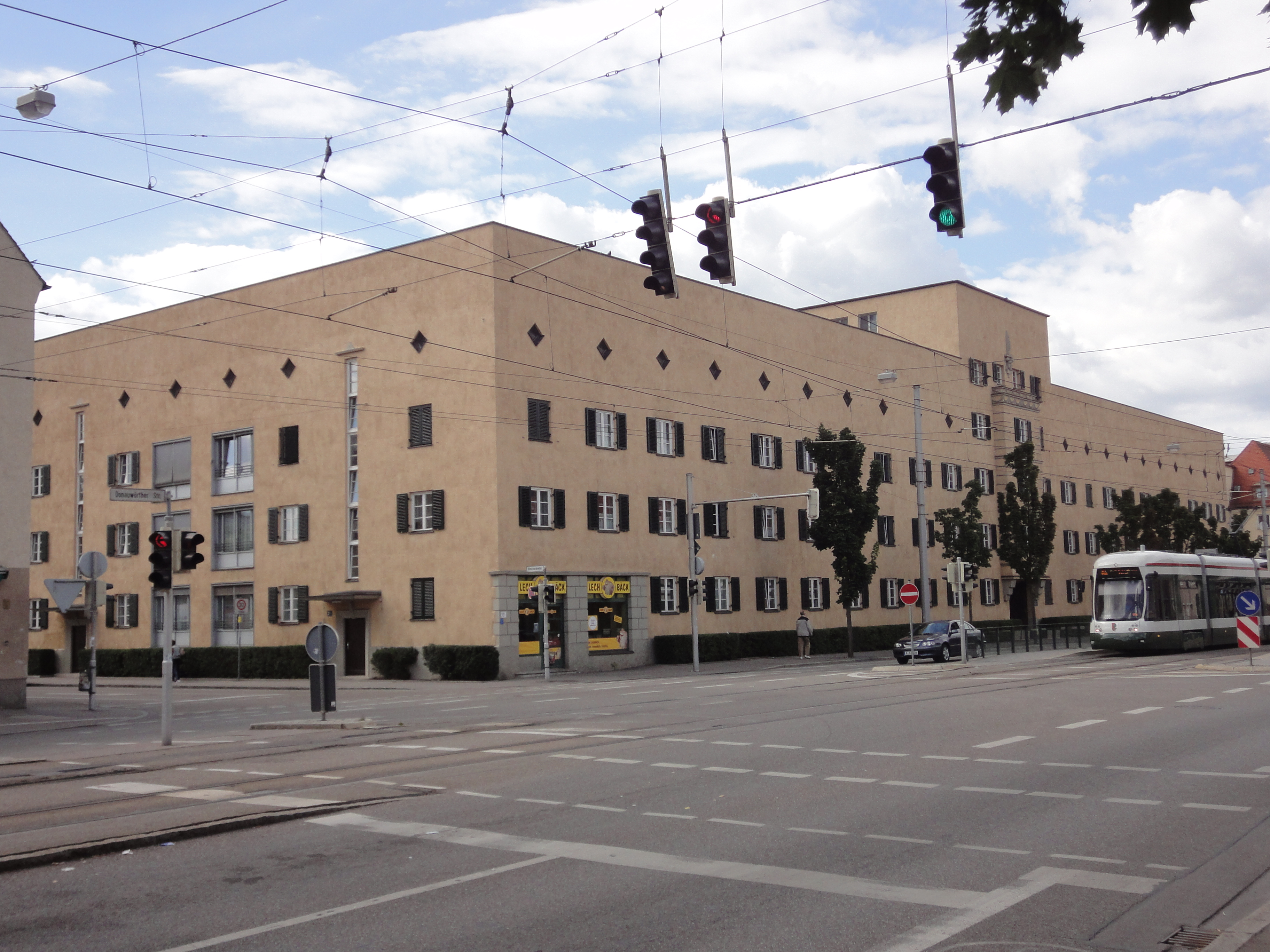 Viergeschossige quadratische Wohnanlage in Augsburg Oberhausen des gemeinnützigen Wohnungsbaus mit zum Innenhof geneigten Pultdächern, Durchgänge in den Mittelachsen des Ost- und Westflügels durch Flacherker und Erhöhung auf fünf Geschosse akzentuiert, an den Ecken zwei Ladeneinbauten, von Otto Holzer, um 1928, in den Binnenstrukturen und Hofansichten durch Modernisierung 2000 stark verändert.